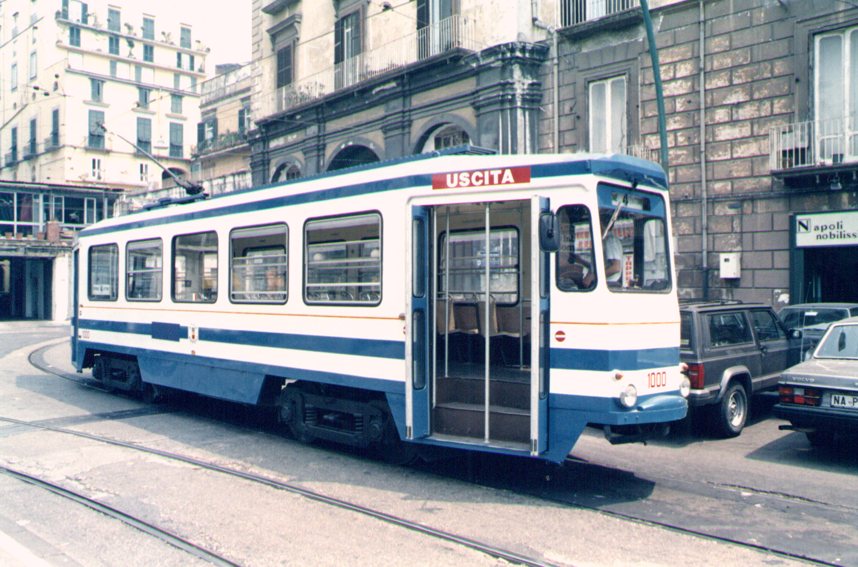 Tram a Napoli